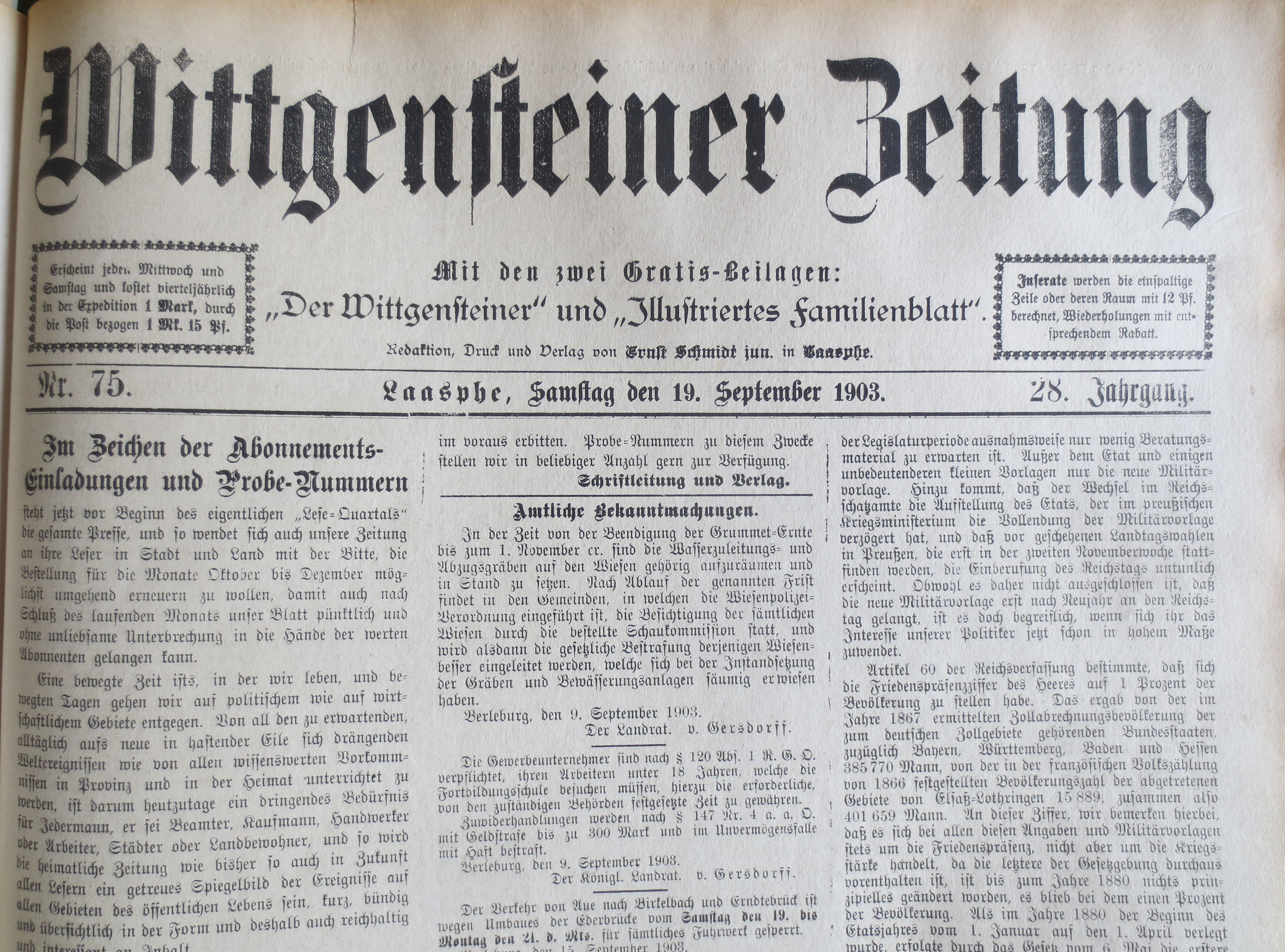 Ausschnitt der Wittgensteiner Zeitung vom 19. September 1903